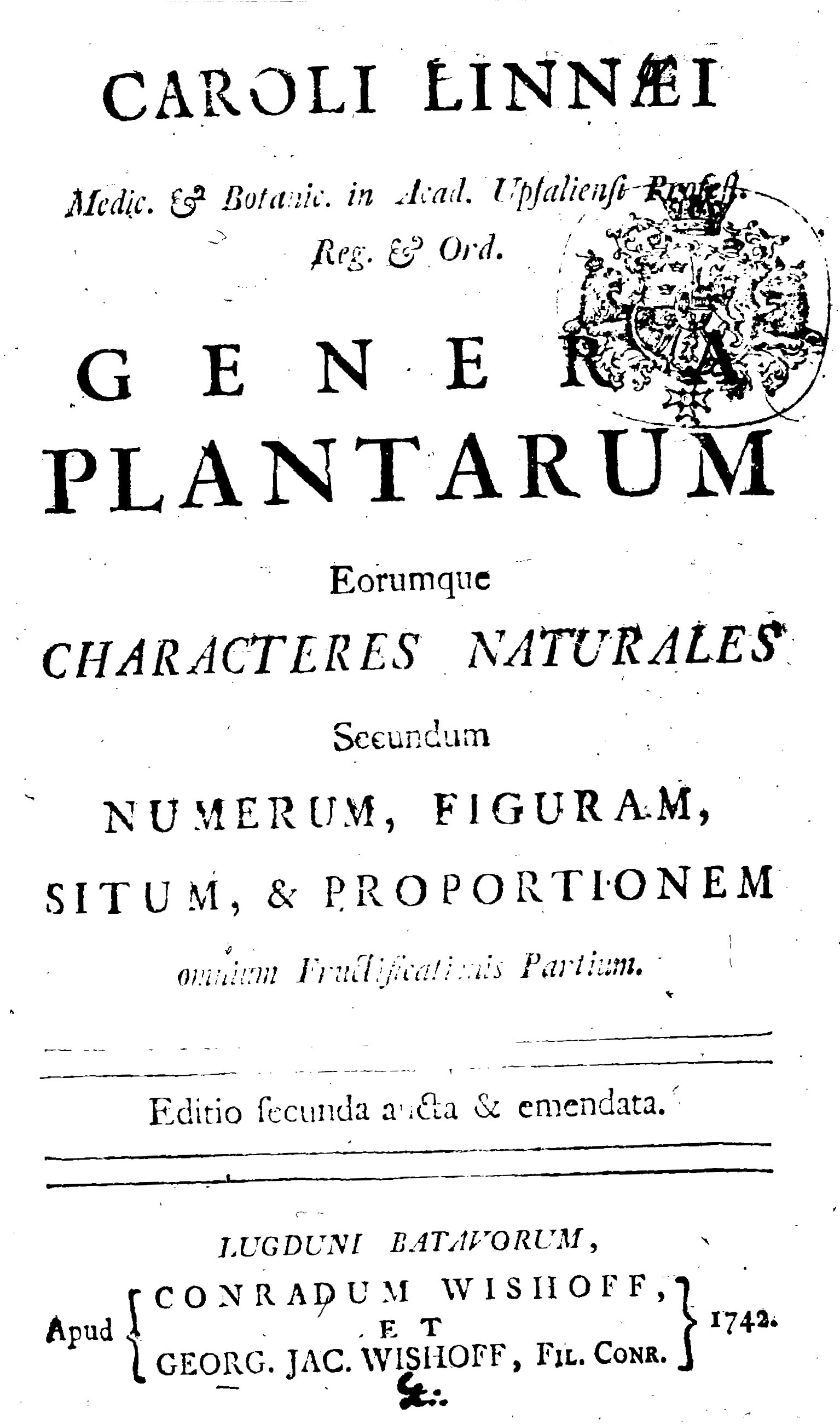 Titelblatt von Carl von Linnés Genera Plantarum, 2. Auflage, 1742